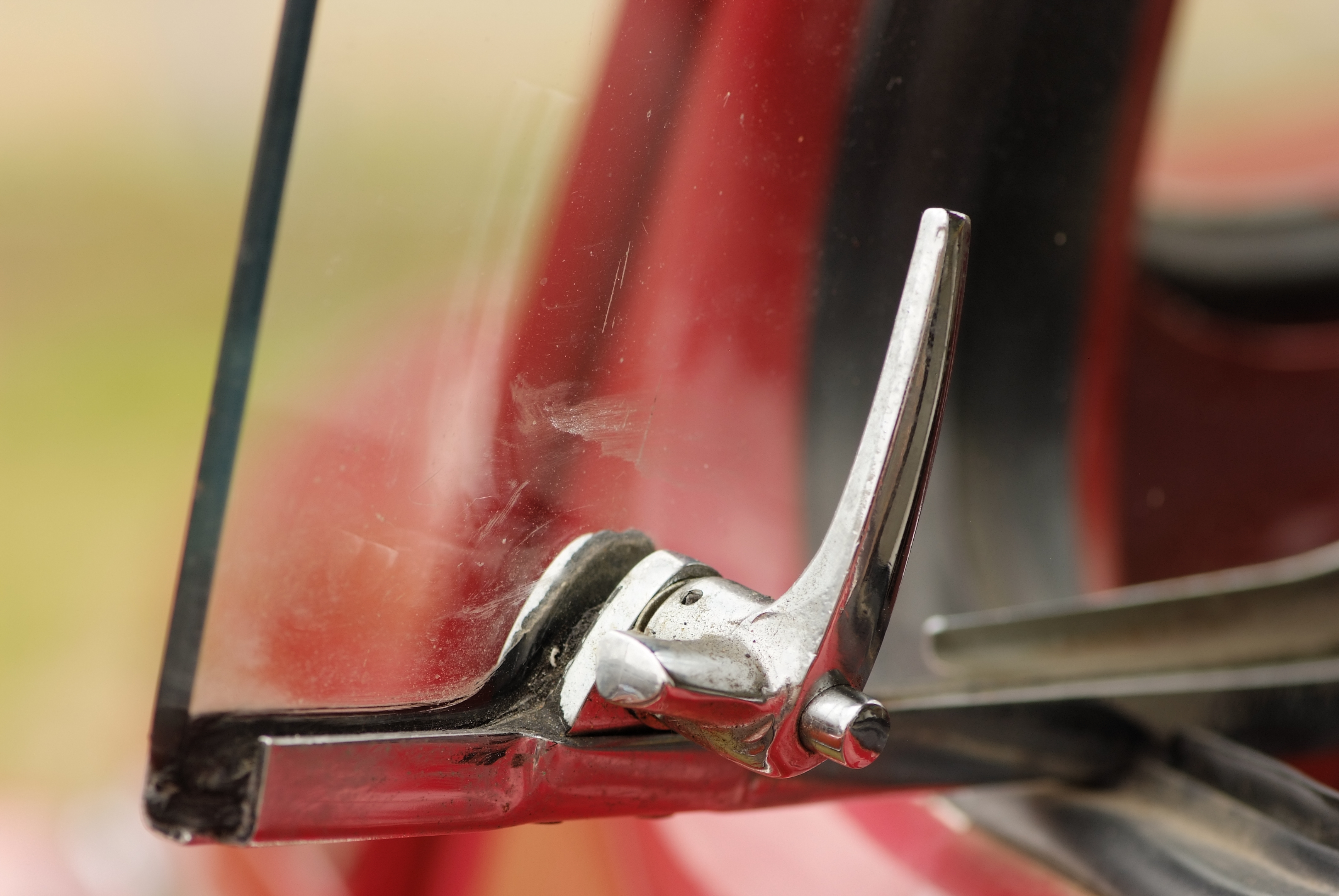 VW 1200 Export, Nachbau (2002) des "Antarctica 1" (Bj. 1962)